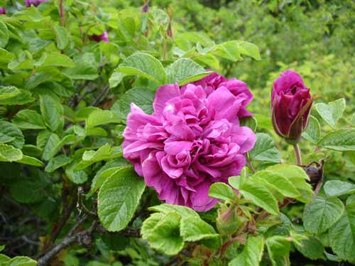 Rosa 'Hansa' (Hybrid Rugosa)